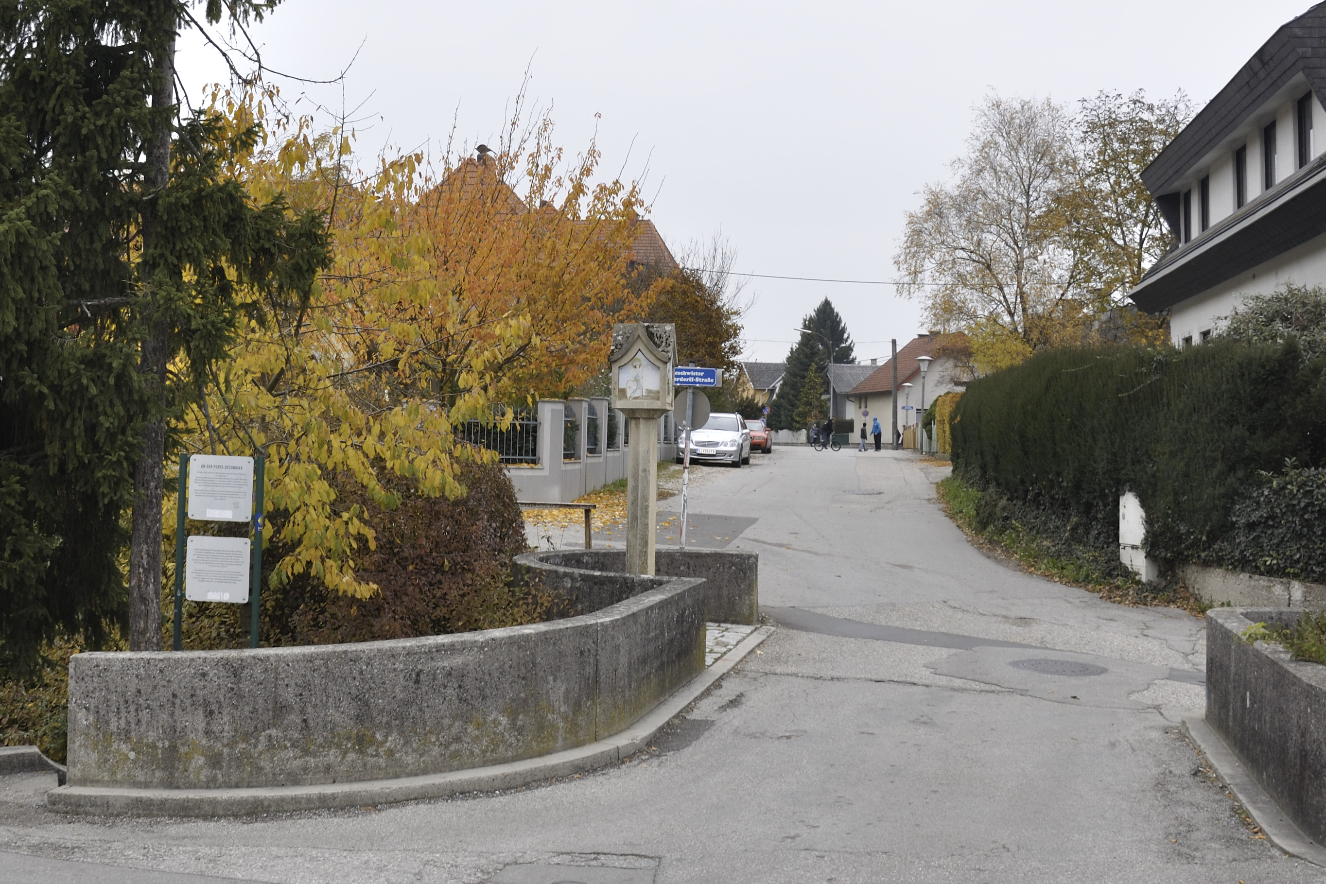 Bleicherbachbrücke mit Bildstock und Stiegenanlage